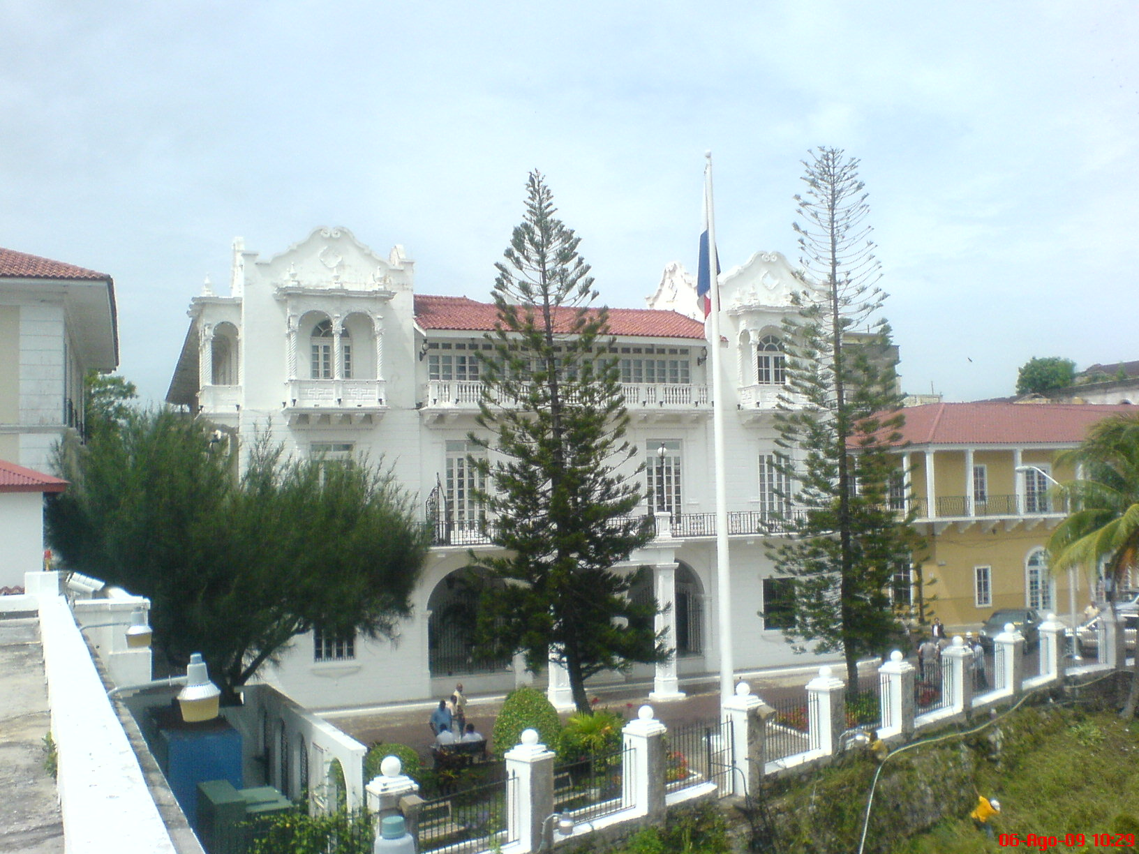 vista frontal del palacio de las garzas (Panamá)